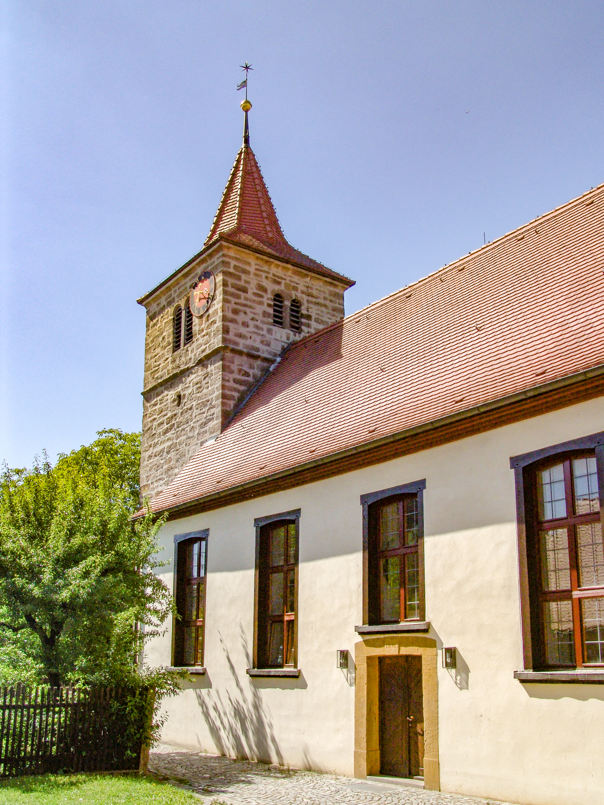 Evang-Luth. Kirche St. Kilian in Marktbergl